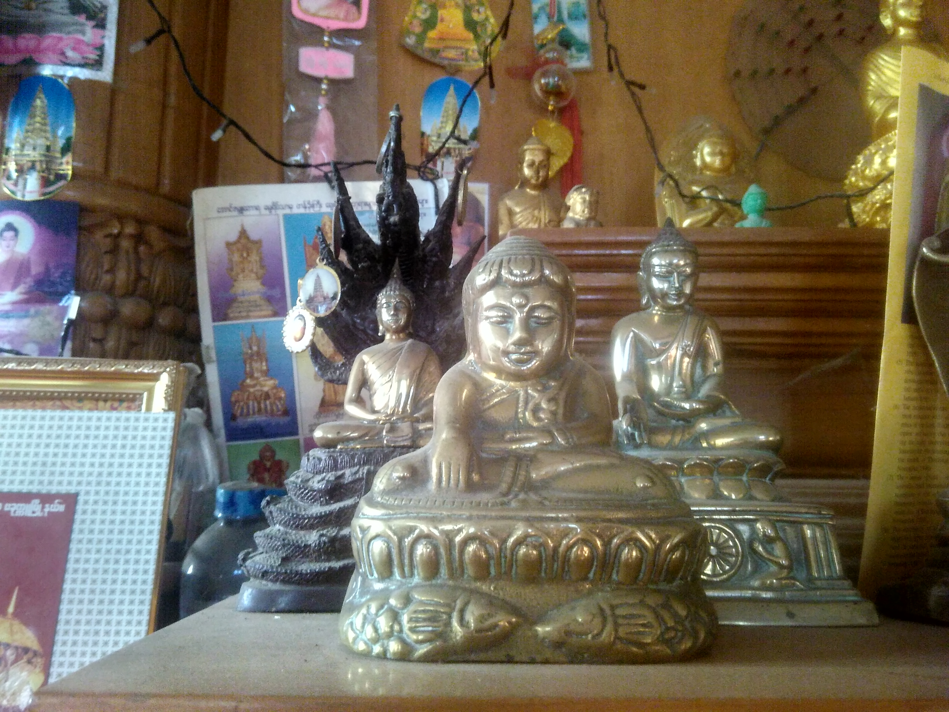 မြန်မာဘာသာ: ဒက္ခိဏသာခါရုပ်ပွားတော်